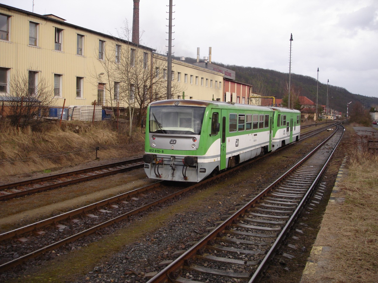 Triebwagen der ČD-Baureihe 812 "Esmeralda" im Bahnhof Nižbor, Tschechien